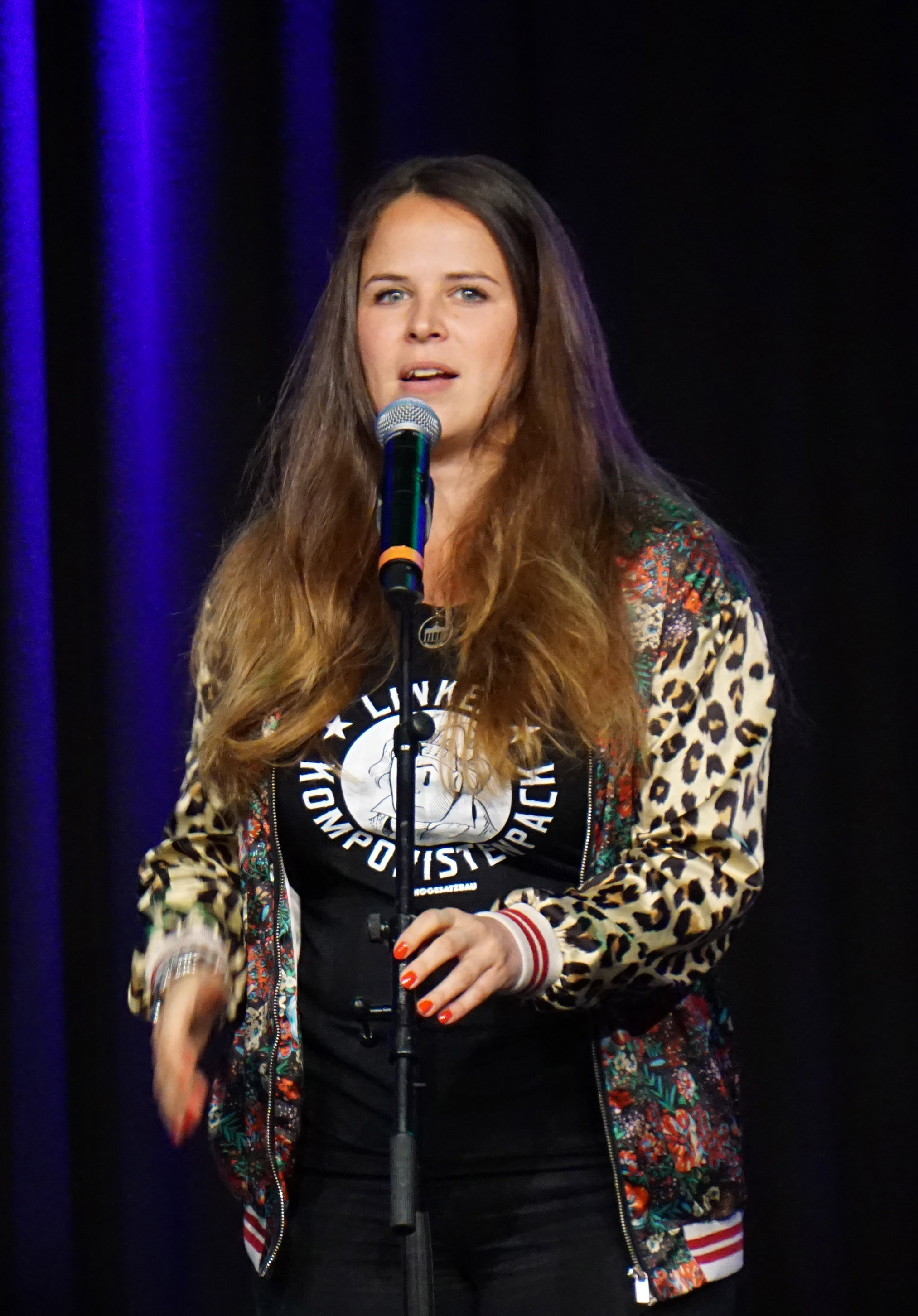 Julia Gámez Martin (deutsche Schauspielerin, Sängerin und Songwriterin) bei NightWash